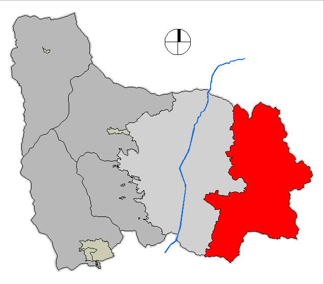 mapa del Corregimiento de Santa Elena. Medellín, Colombia.